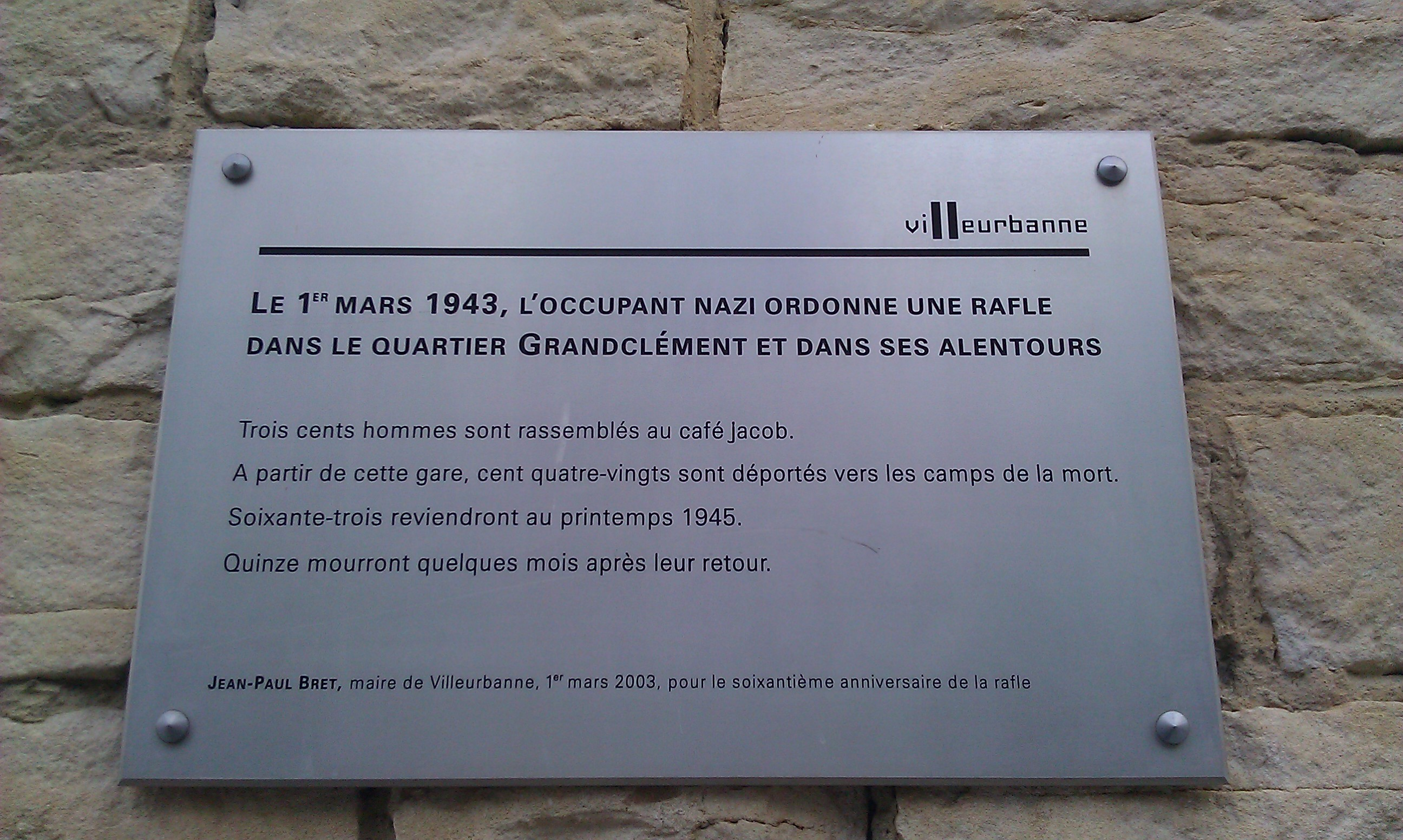 Plaque commémorative sur la façade de la gare de Villeurbanne, relative à la grande rafle des Villeurbannais du 1er mars 1943.